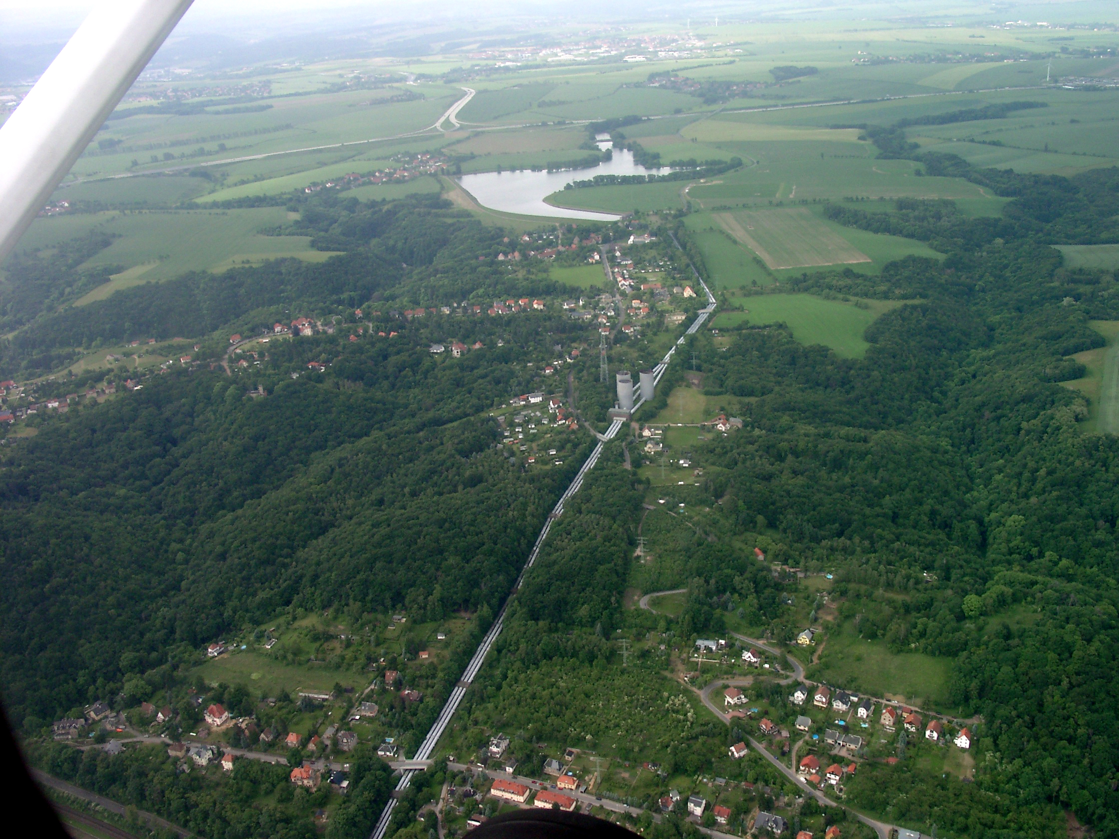 Speichersee des Pumpspeicherwerk Niederwartha; im Hintergrund das Autobahndreieck Dresden-West